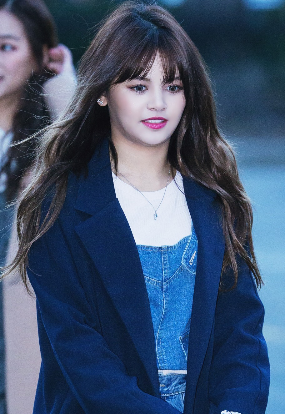 170224 뮤직뱅크 출근길 CLC Sorn